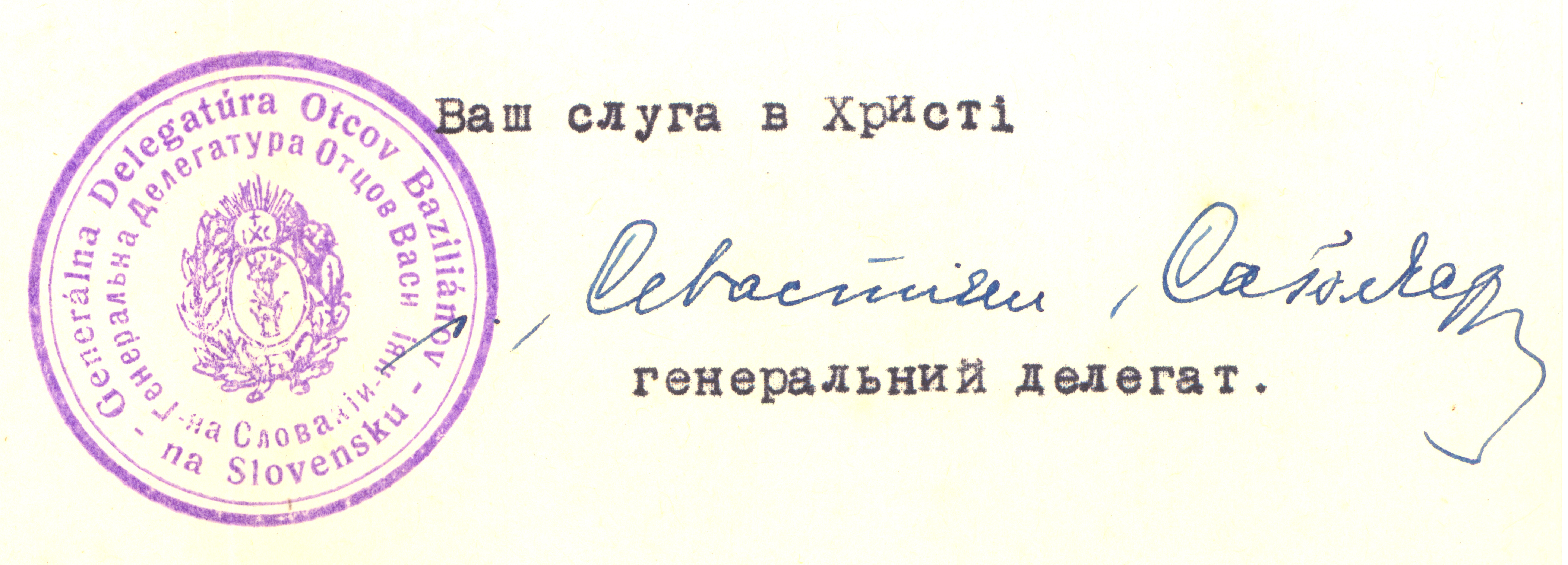 Підпис и печатка С. Сабола, ЧСВВ, як генерального делегата Чехословцькой делегатури Василіян із р. 1947. Document scanned by Jozafát Vladimír Timkovič, OSBM